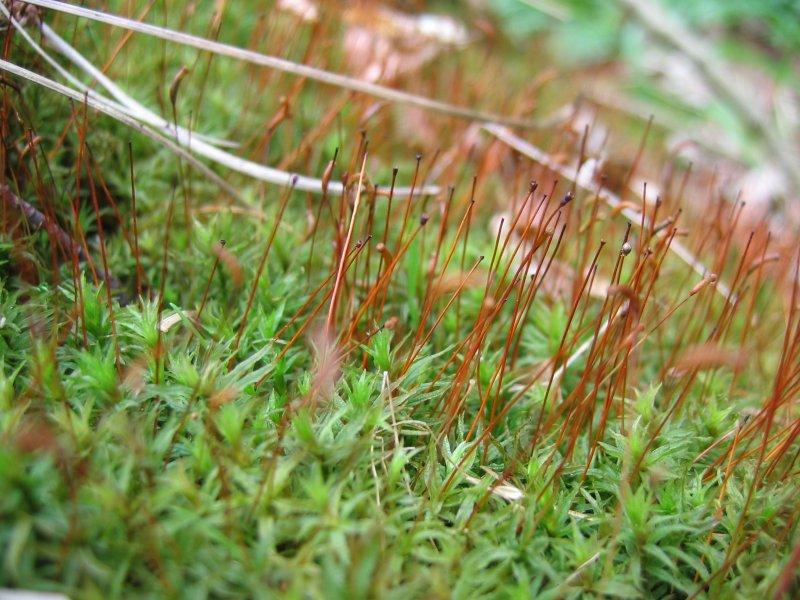 Atrichum undulatum Sporogonen, Pölchow Nähe Rostock